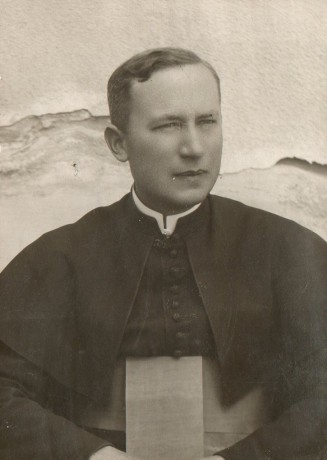 Dechant der kath. Pfarrgemeinde von Balatonlelle